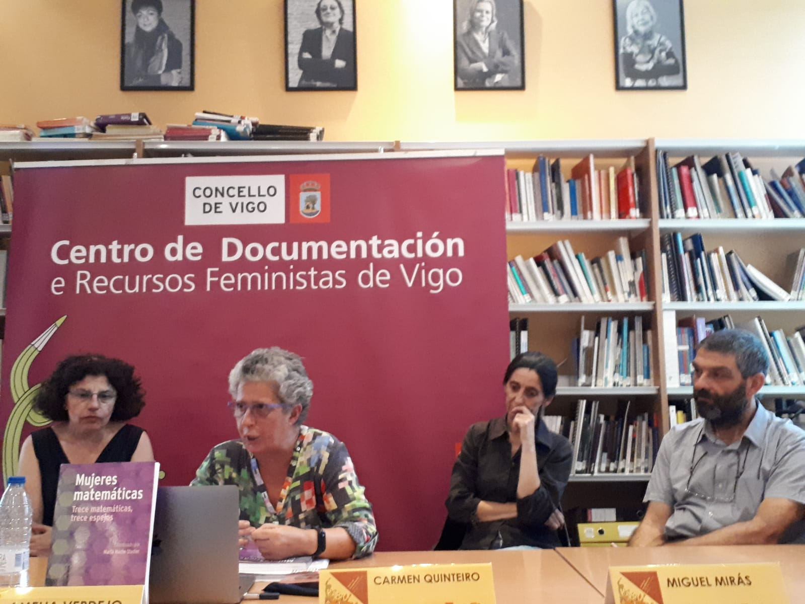 presentación libro